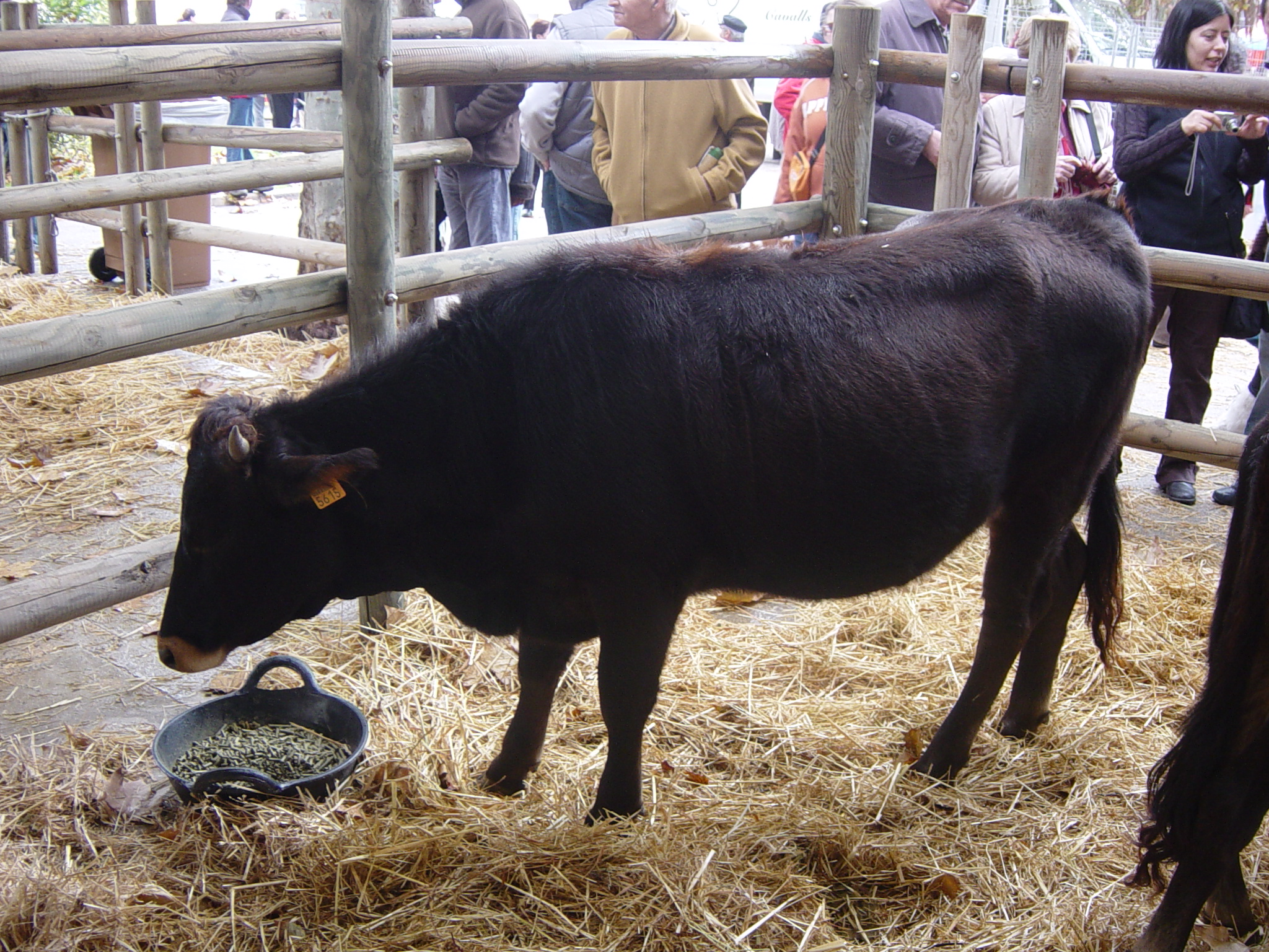 Vaca mallorquina a la fira del Dijous Bo a Inca, Mallorca.